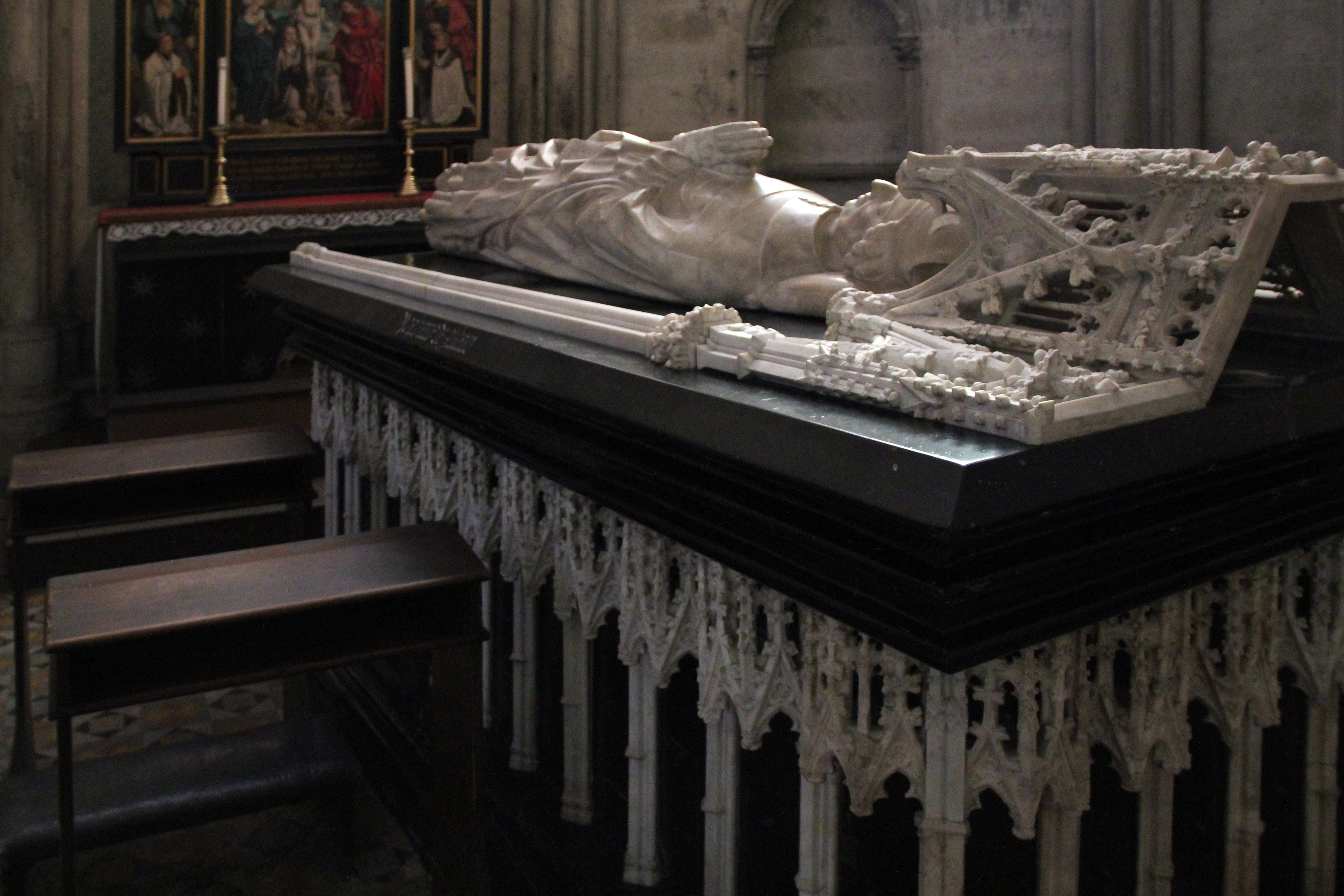 Dom zu Köln, Grabmal des Erzbischofs Walram von Jülich (1332-49)